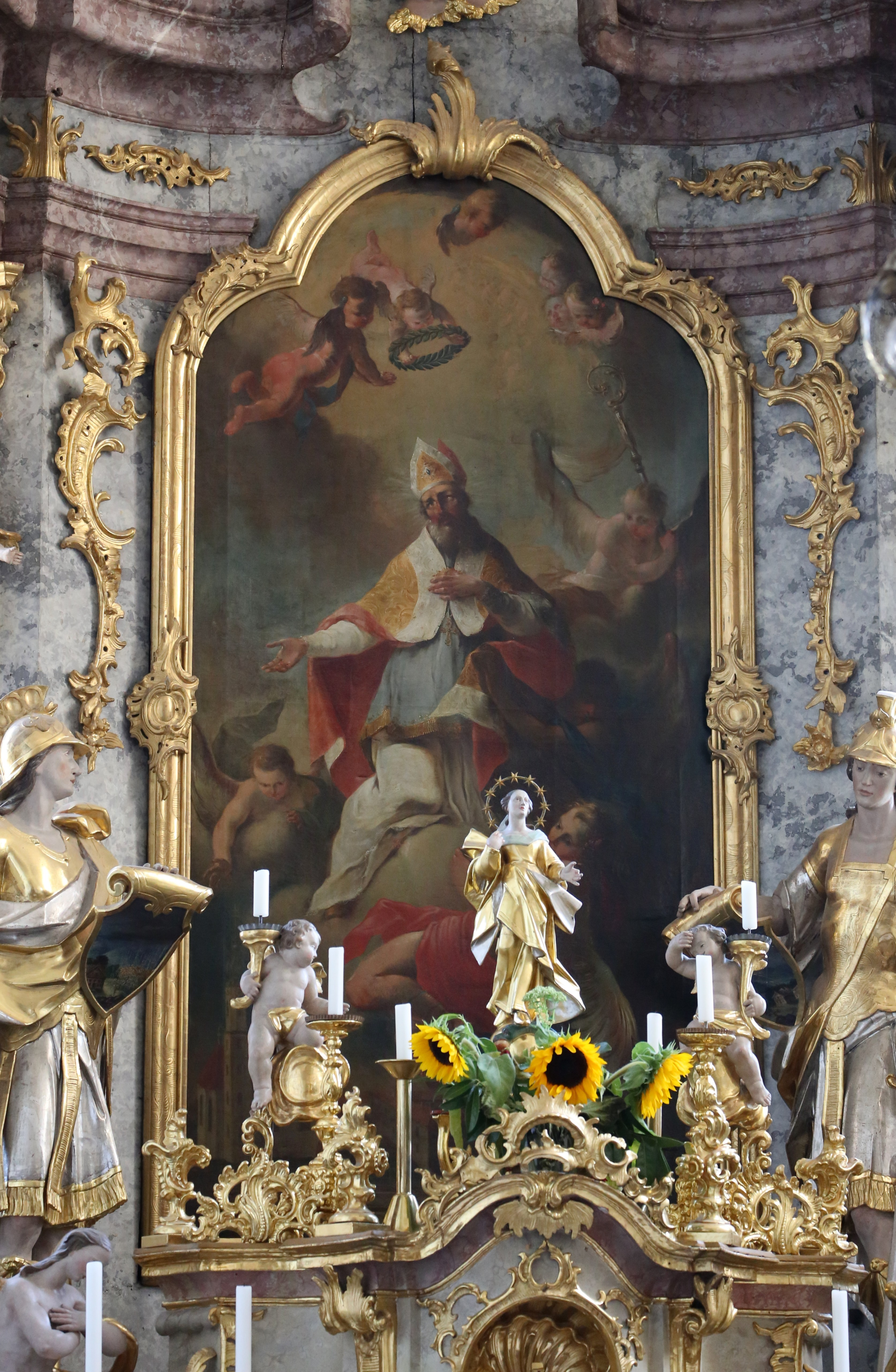 Kirchplatz 2, Höslwang; Kath. Pfarrkirche St. Nikolaus, Saalbau mit Satteldach, Nordturm mit Zwiebel, eingezogenem Chor und südlichem doppelstöckigen Anbau als Oratoriengang (Antoniuskapelle von 1693), spätgotisch, im Kern 15. Jh., barocker Ausbau 1734 durch Martin Pöllner, 1740 Turmoberbau, 1922 Verlängerung mit baulicher Verbindung zum westlichen Pfarrhof; mit Ausstattung.